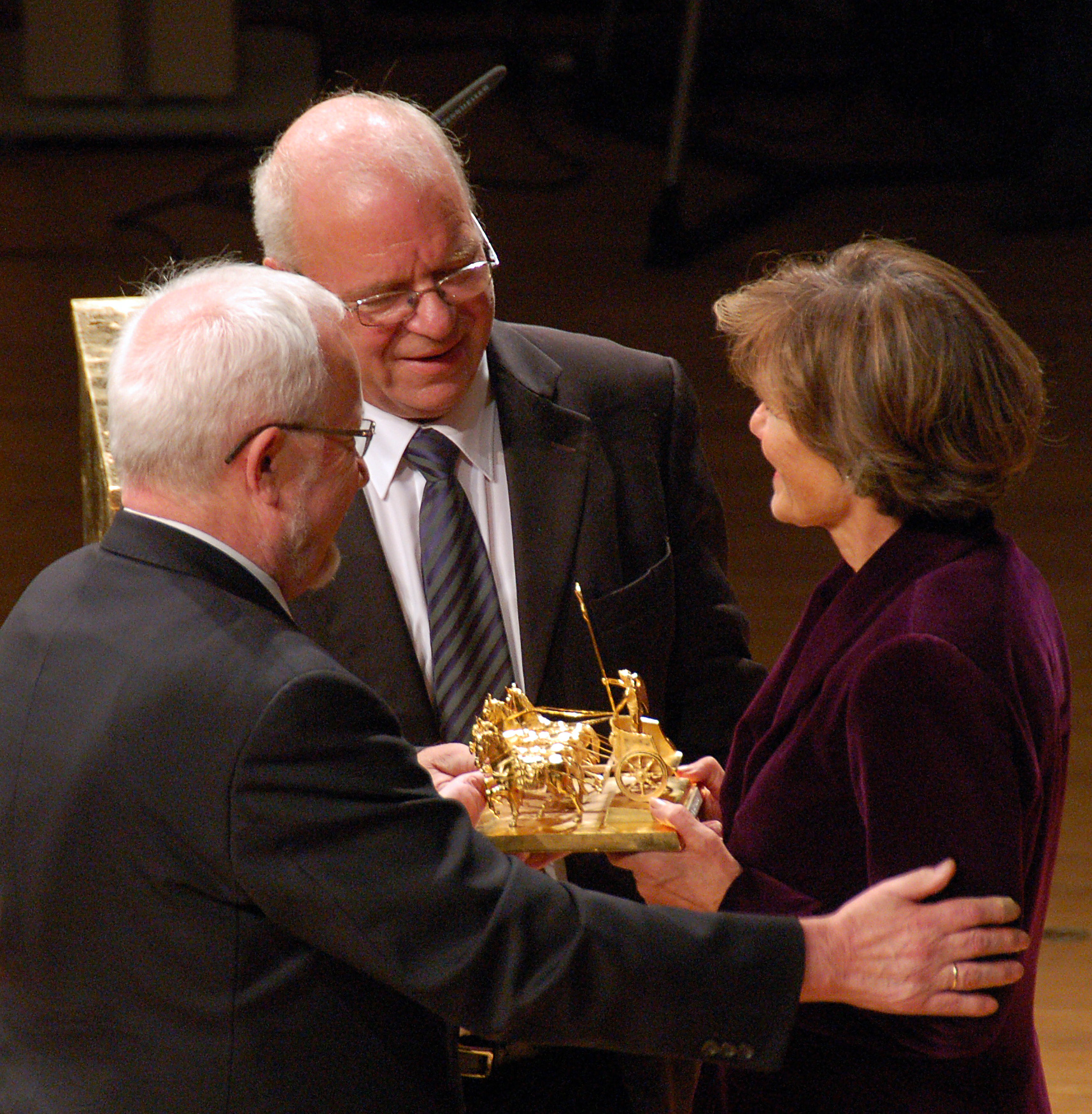 Preisverleihung Quadriga 2010. Laudator Richard Schröder (m.), Theologe und ehemaliges Mitglied der Volkskammer und des Bundestags, verleiht die Quadriga in der Kategorie "Architektur der Einheit" an Lothar de Maizière (l.) und Wolfgang Schäuble, dessen Ehefrau Ingeborg Schäuble (r.) den Preis stellvertretend in Empfang nimmt.